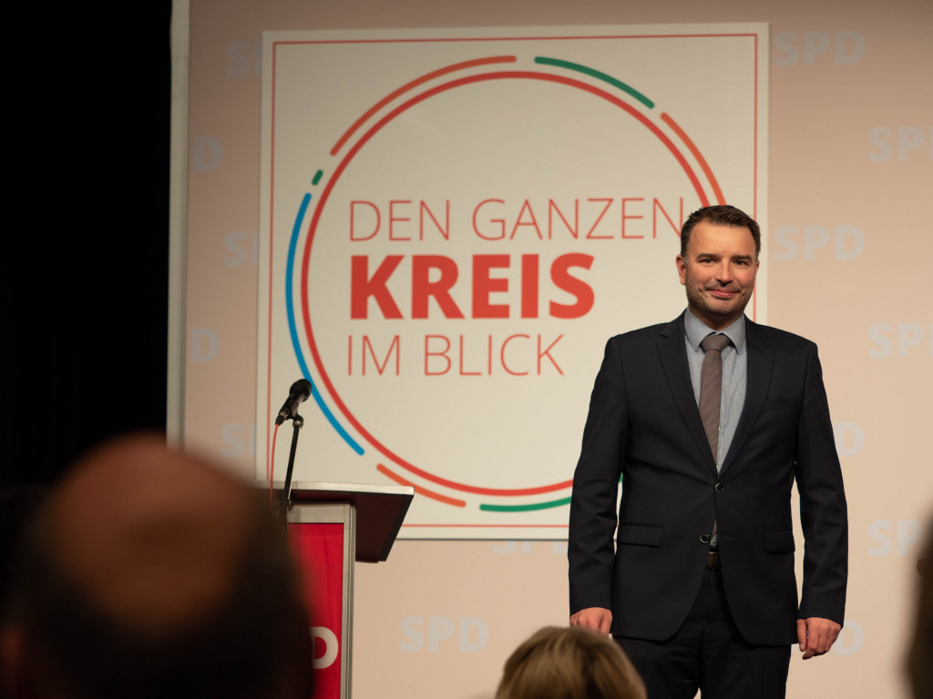 Michael Hübner bei der Kandidadur zum Landrat